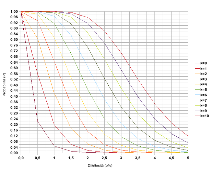 Grafico di alcuni esempi di Curve Operative per il pino di campionamento per attributi